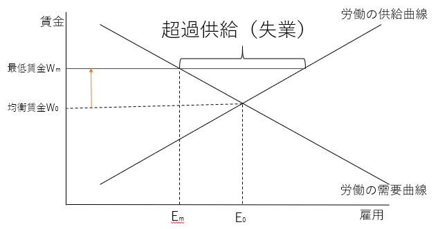 完全競争下の場合、均衡賃金より高い最低賃金は、失業を生みます。